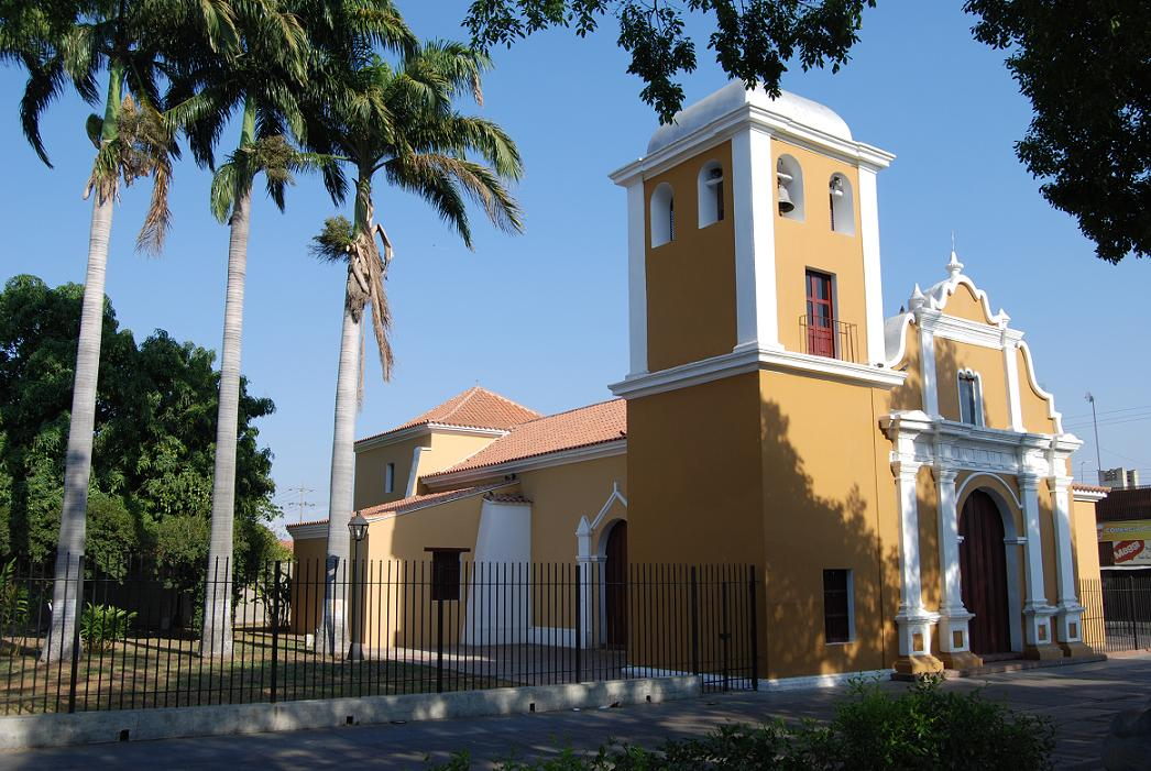 Church of Los Guayos, Venezuela